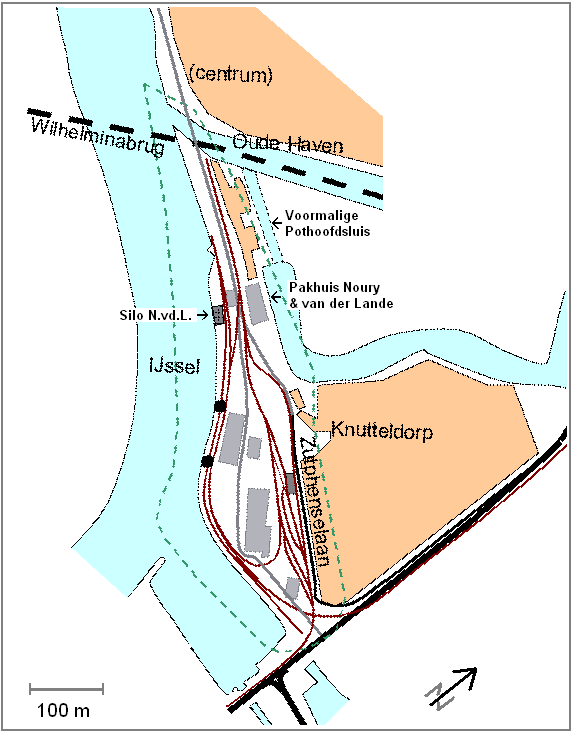 Pothoofd tot ca. 1970. Kaart van eigen makelij. Gaarne bron (Wikipedia) en auteur (T.C. Nijeholt) vermelden bij overname / verwijzing.